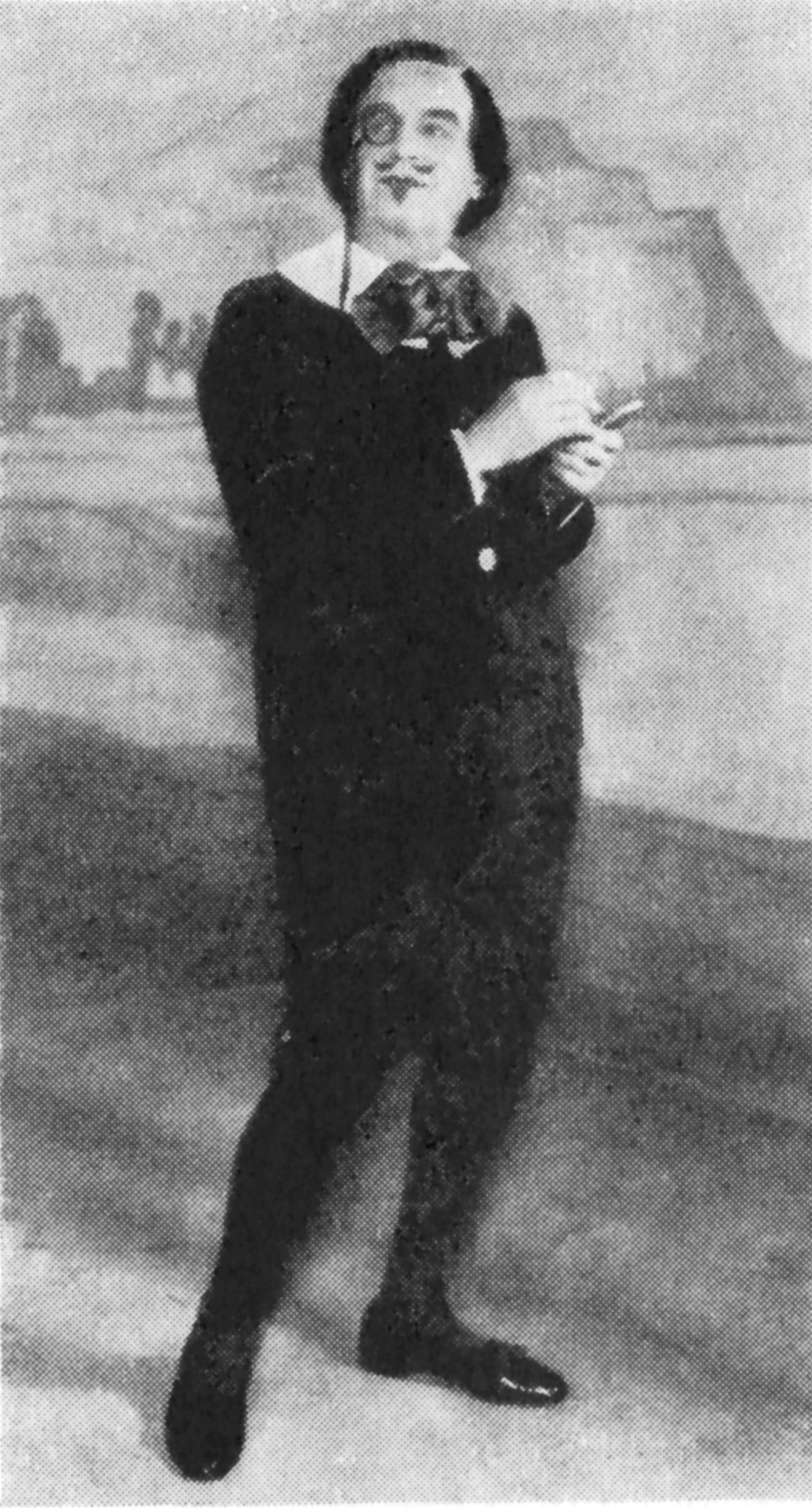 Uraufführungssänger Henry Lytton als Bunthorne mit "weicher" Hüfthaltung, Samtanzug und Frisur à la Oscar Wilde